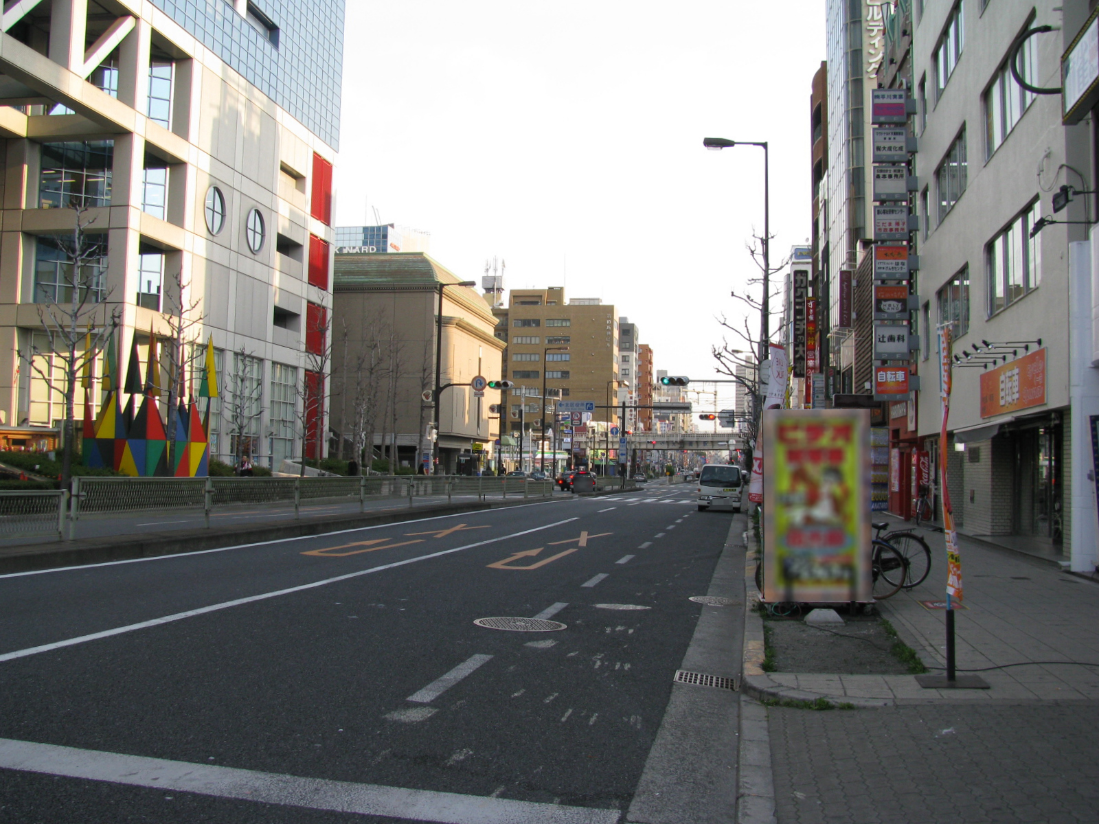 大阪市営地下鉄扇町駅